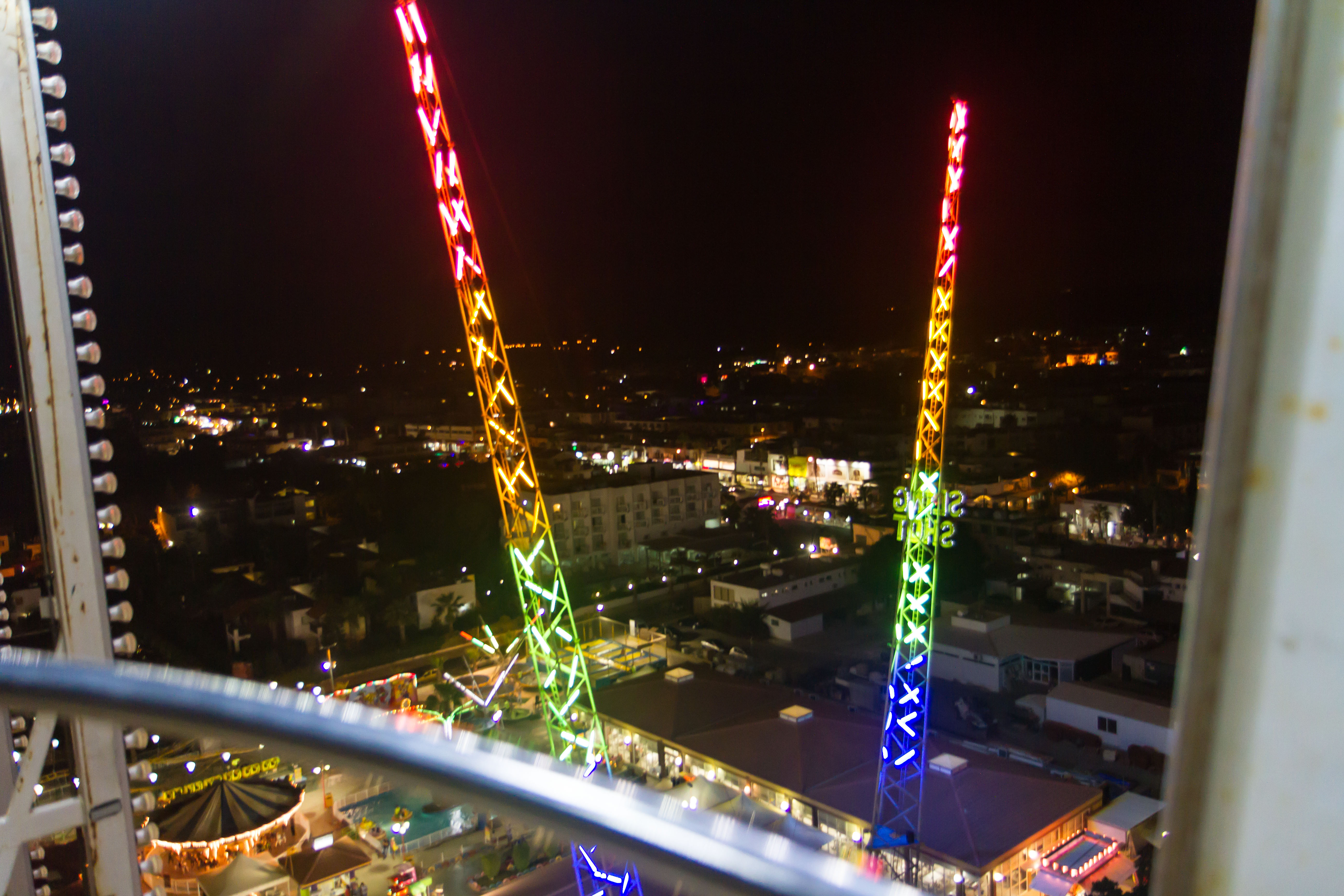 Ayia Napa, Cyprus